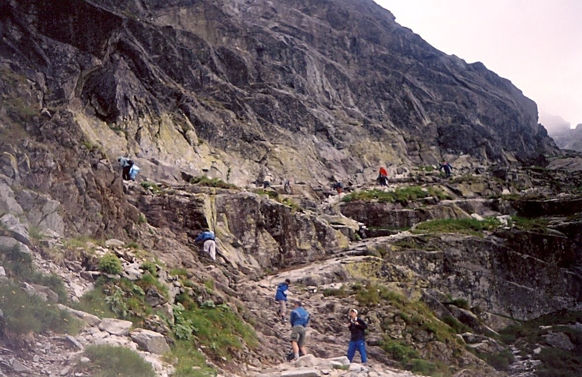 Magas-Tátra,_Tengerszem-csúcs_felé_a_Békás-tavi_katlanban_láncos_mászás.jpg